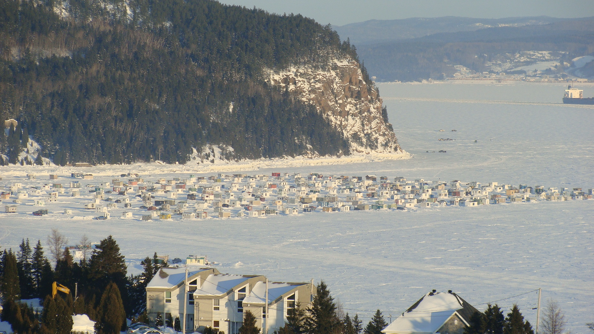 Village sur glace de l'Anse-à-Benjamin, à La Baie (Québec, Canada).